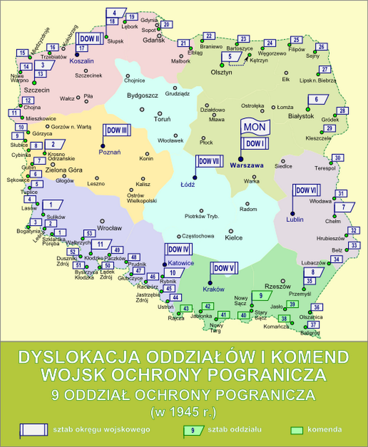 Dyslokacja oddziałów i komend Wojsk Ochrony Pogranicza - 9 Oddział Ochrony Pogranicza w 1945 r.